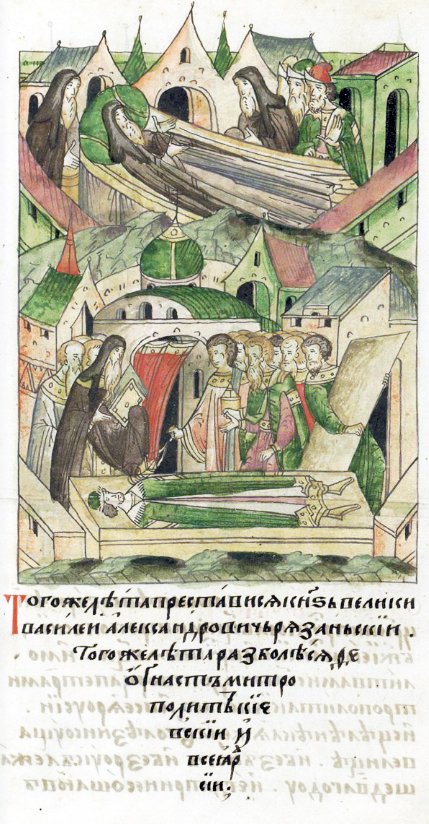 ЛИЦЕВОЙ ЛЕТОПИСНЫЙ СВОД В том же году преставился великий князь Василий Александрович Рязанский. В том же году разболелся Феогност, митрополит Киевский и всея Руси.